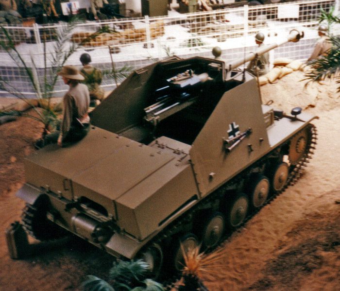 Beschreibung: Marder II (Sd.Kfz.131) Heckansicht